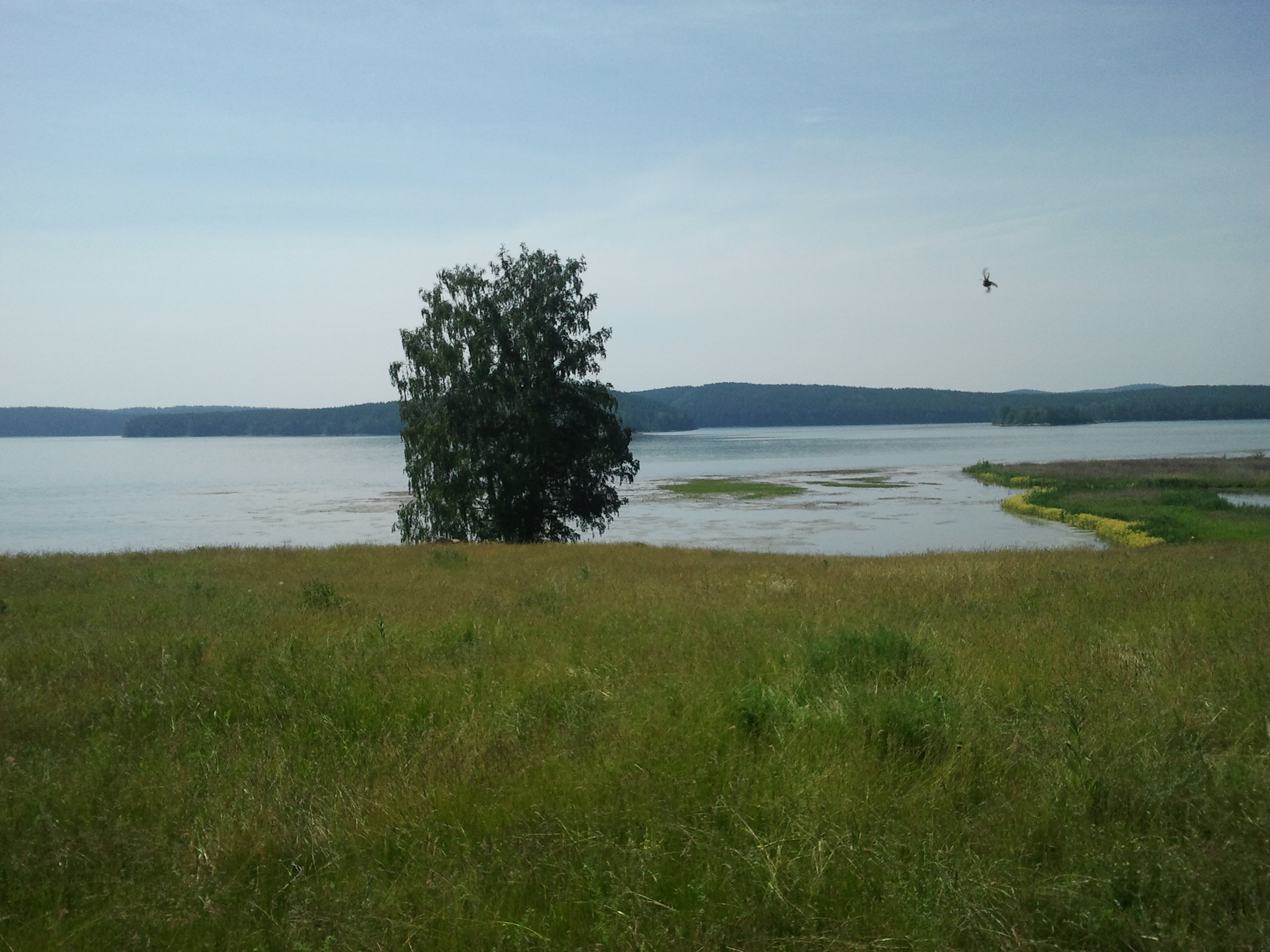 Берег Малого Миассова озера.